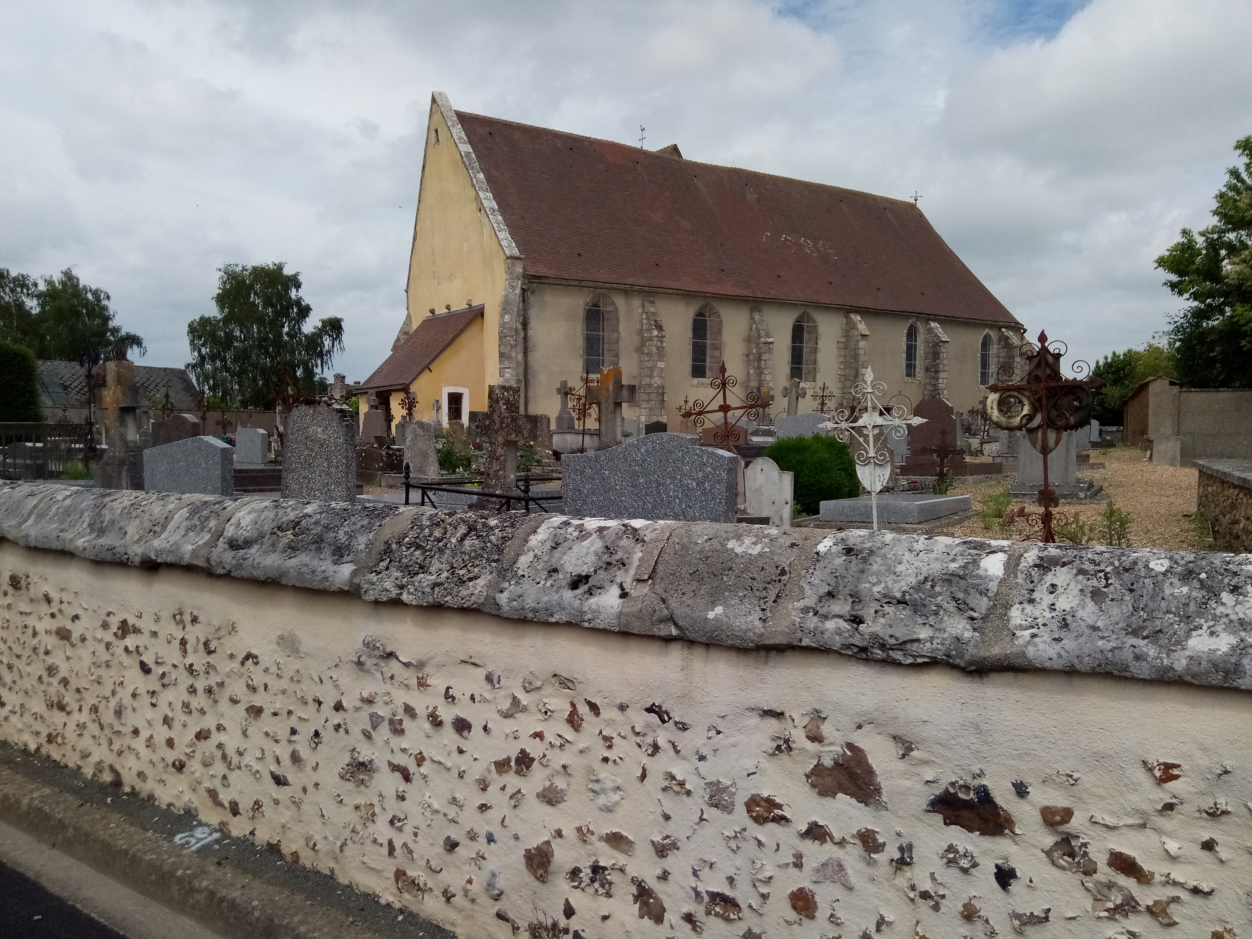 Église Saint-Grégoire à Gasville-Oisème